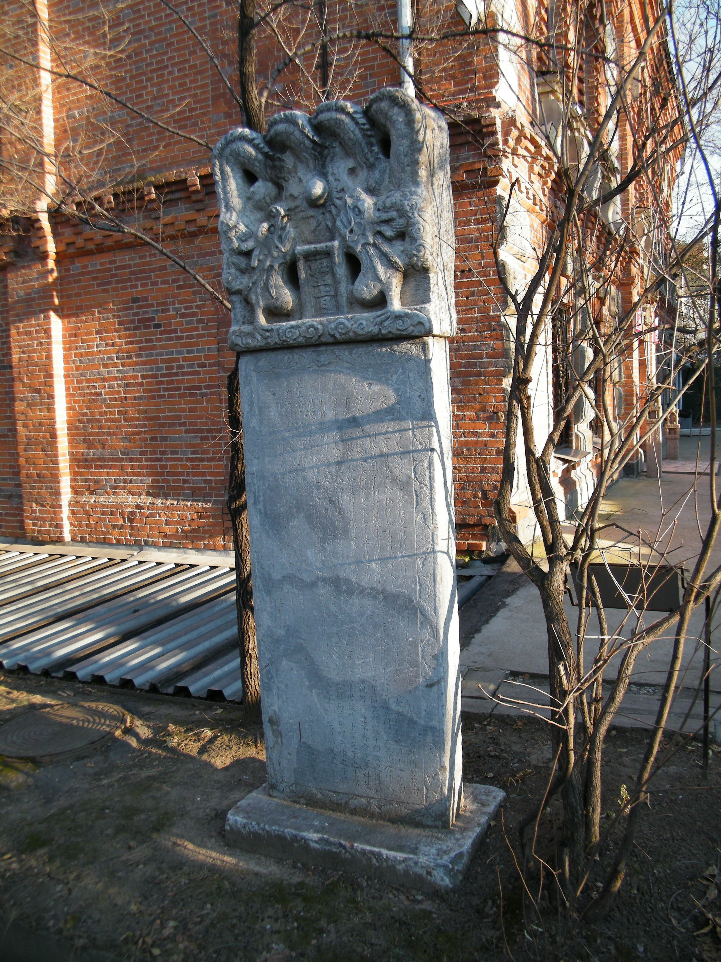 Почётный памятник целомудрию и верности супруги покойного Господина Бао Юнчуня из корпуса Окаймлённого Жёлтого знамени ханьской армии (1885 год). Доставлена в музей Н. И. Гродековым в 1899 году.